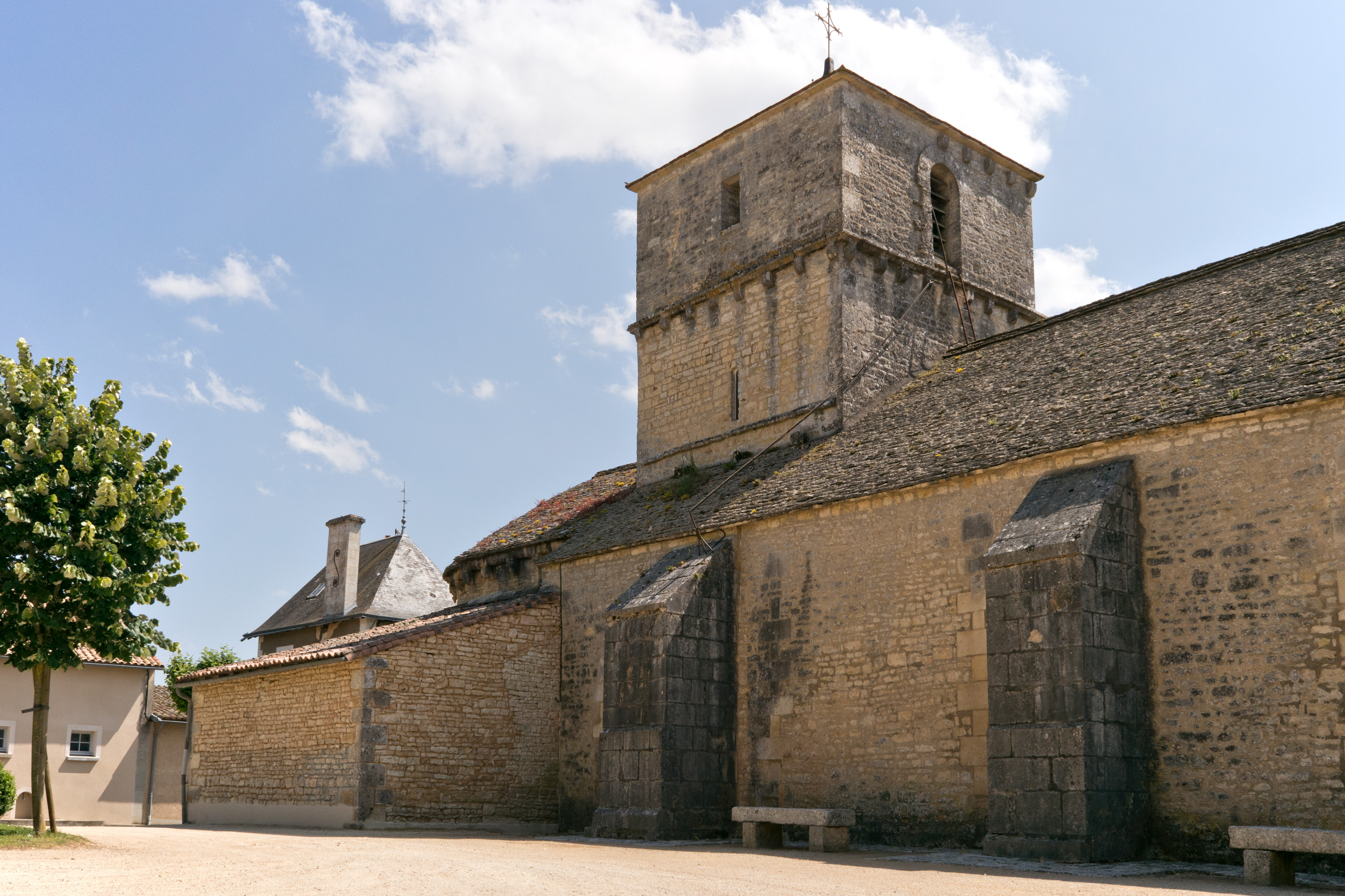 Église Saint-Martin de Brux